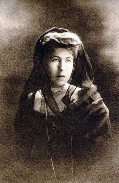 Alexandra von Sachsen-Coburg und Gotha anlässlich der Tode des Bruders und ihrem Vater.